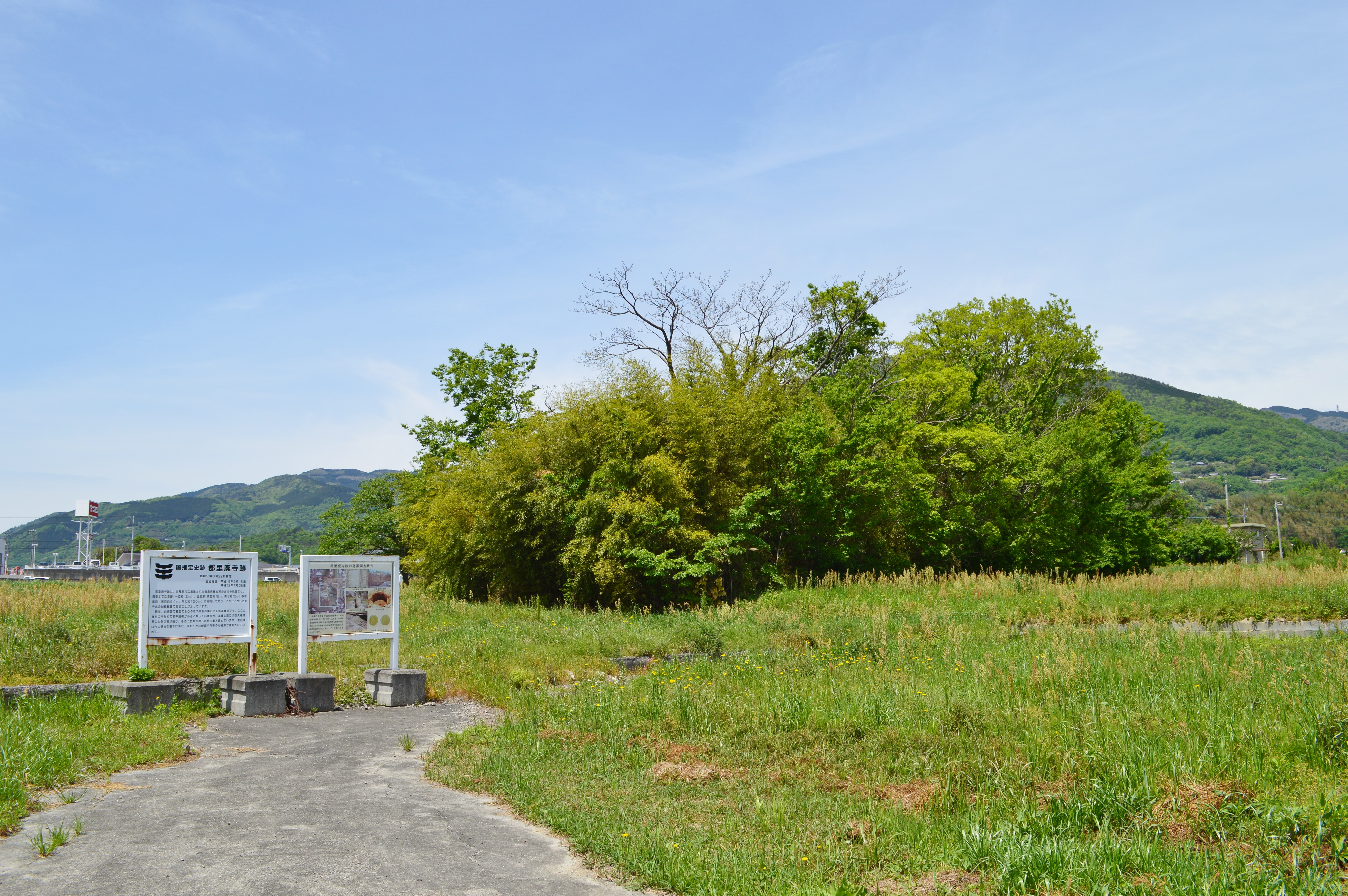 郡里廃寺跡 伽藍全景 Nikon D3200